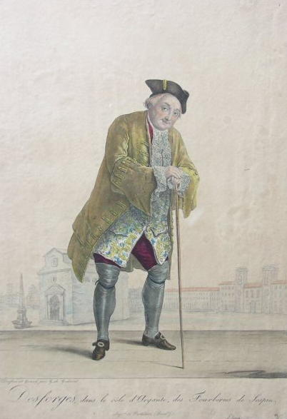 Desforges dans Les Fourberies de Scapin